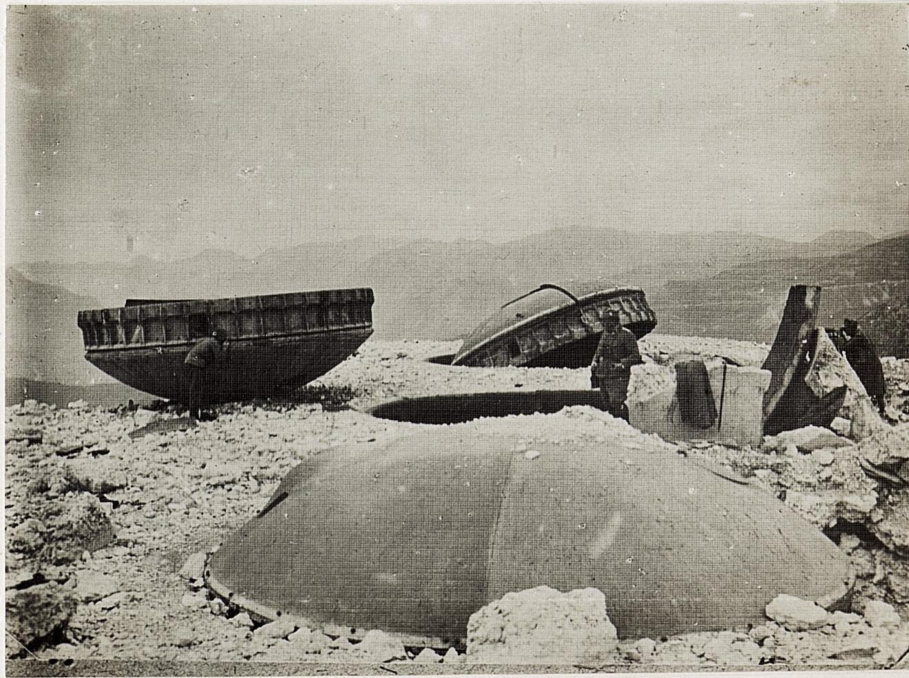 Verdeck des eroberten Werks Campolongo.